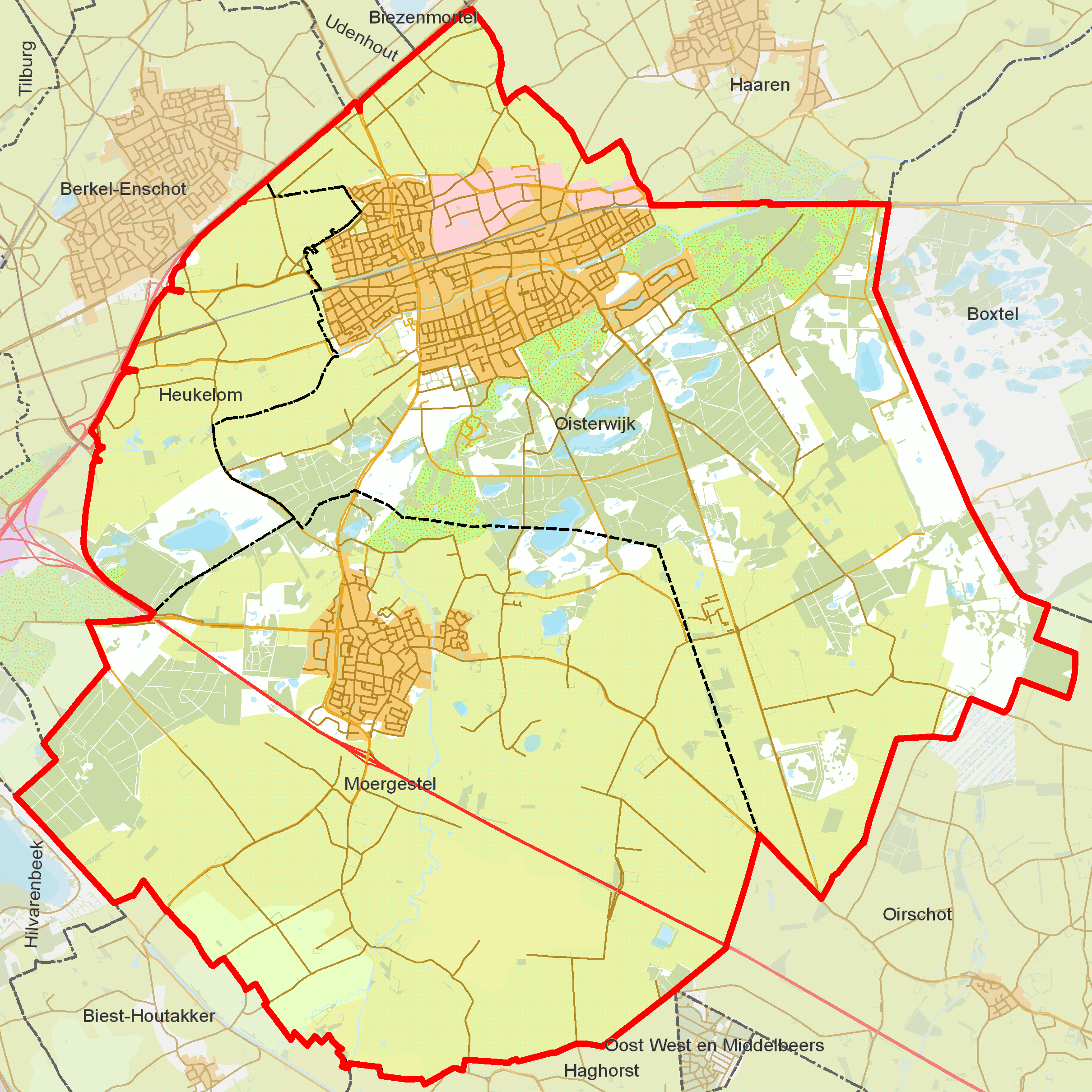 BAG woonplaatsen - Gemeente Oisterwijk.png